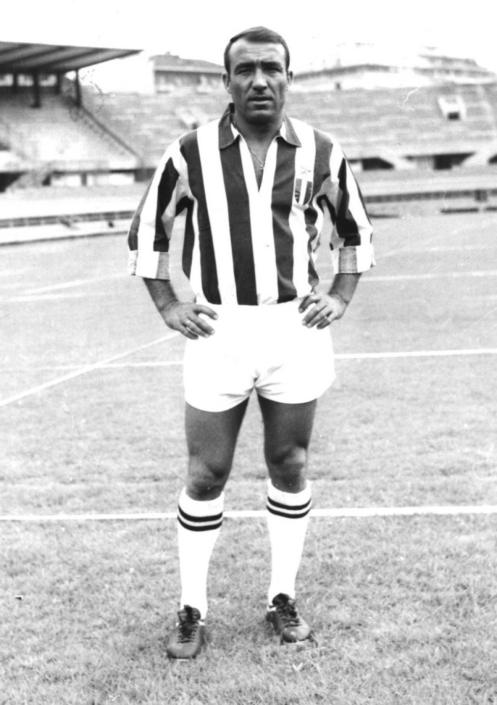 Il calciatore spagnolo Luis del Sol alla Juventus nella stagione 1967-68, in posa all'interno dello stadio Comunale di Torino.